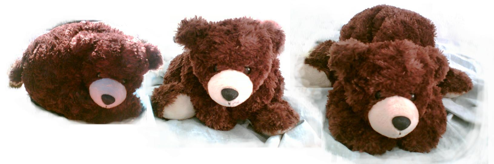 Ours en peluche des Pyrénées Photographié le 17 septembre 2006